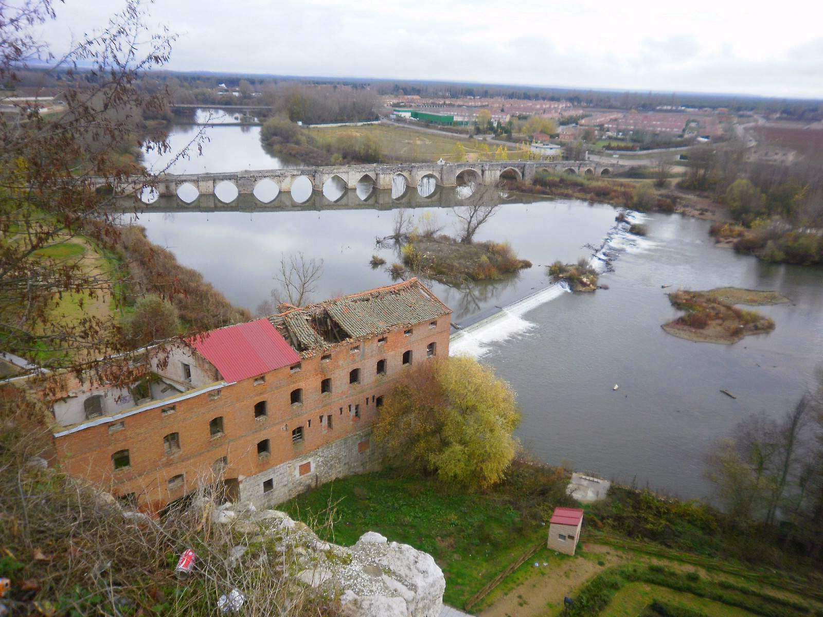 Simancas (Valladolid)